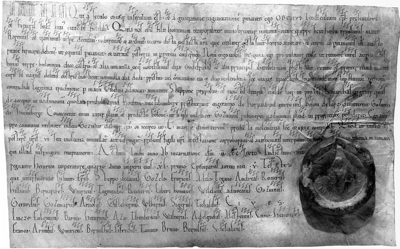 Schenkingsoorkonde uit 1096 van bisschop Otbert van Luik ten behoeve van de Onze-Lieve-Vrouwekerk in Maastricht. Het is het oudste in het kapittelarchief bewaarde document. Collectie RHCL Maastricht, RAL, Kapittel OLV, nr. 640.